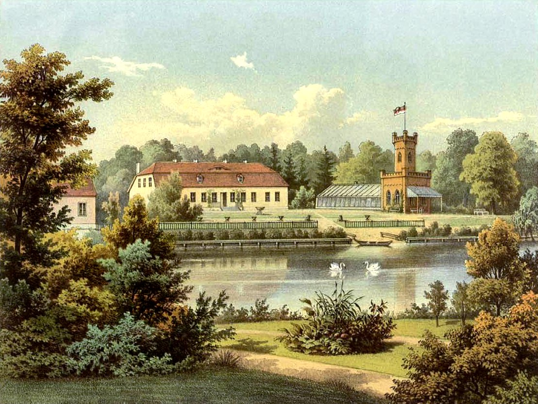 Rittergut Willkamm, Kreis Gerdauen, Provinz Preußen